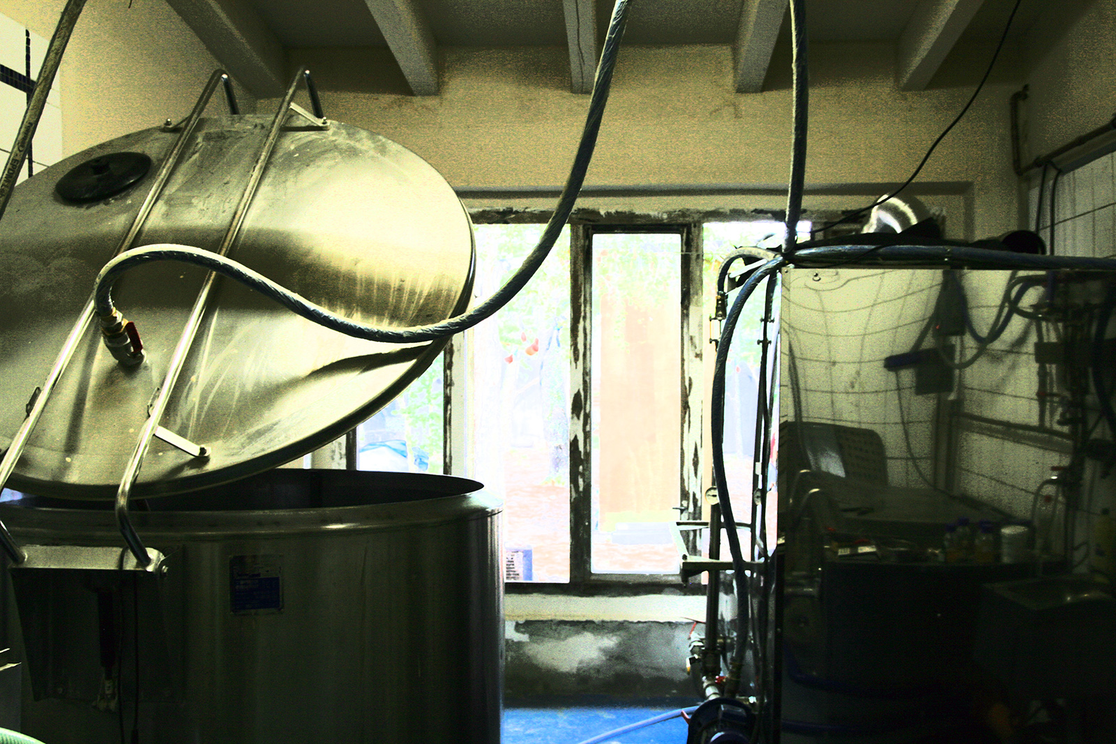 Kesselraum in der Brauerei Zukunft am Ostkreuz / Laskerstrasse